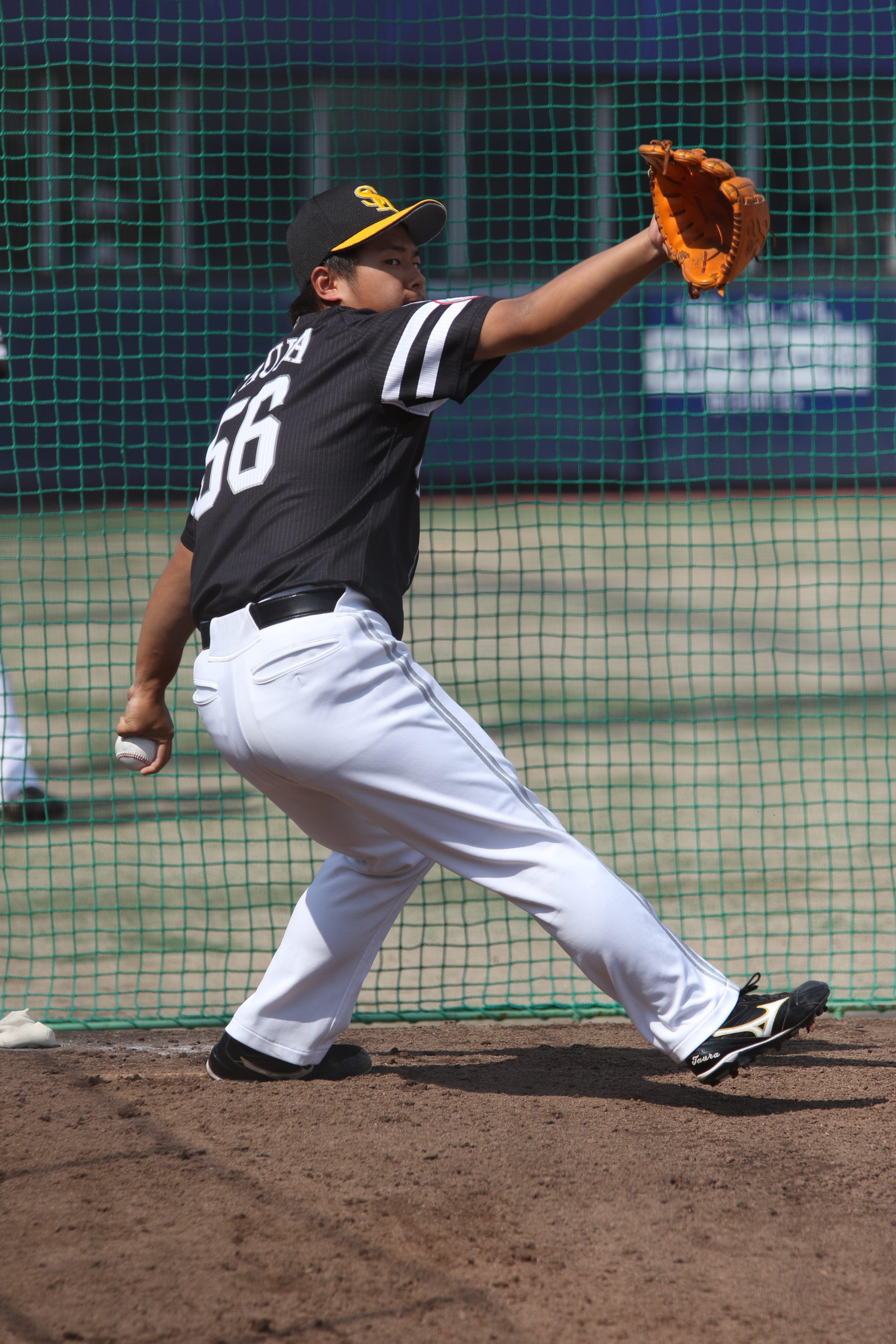 投球練習中の田浦